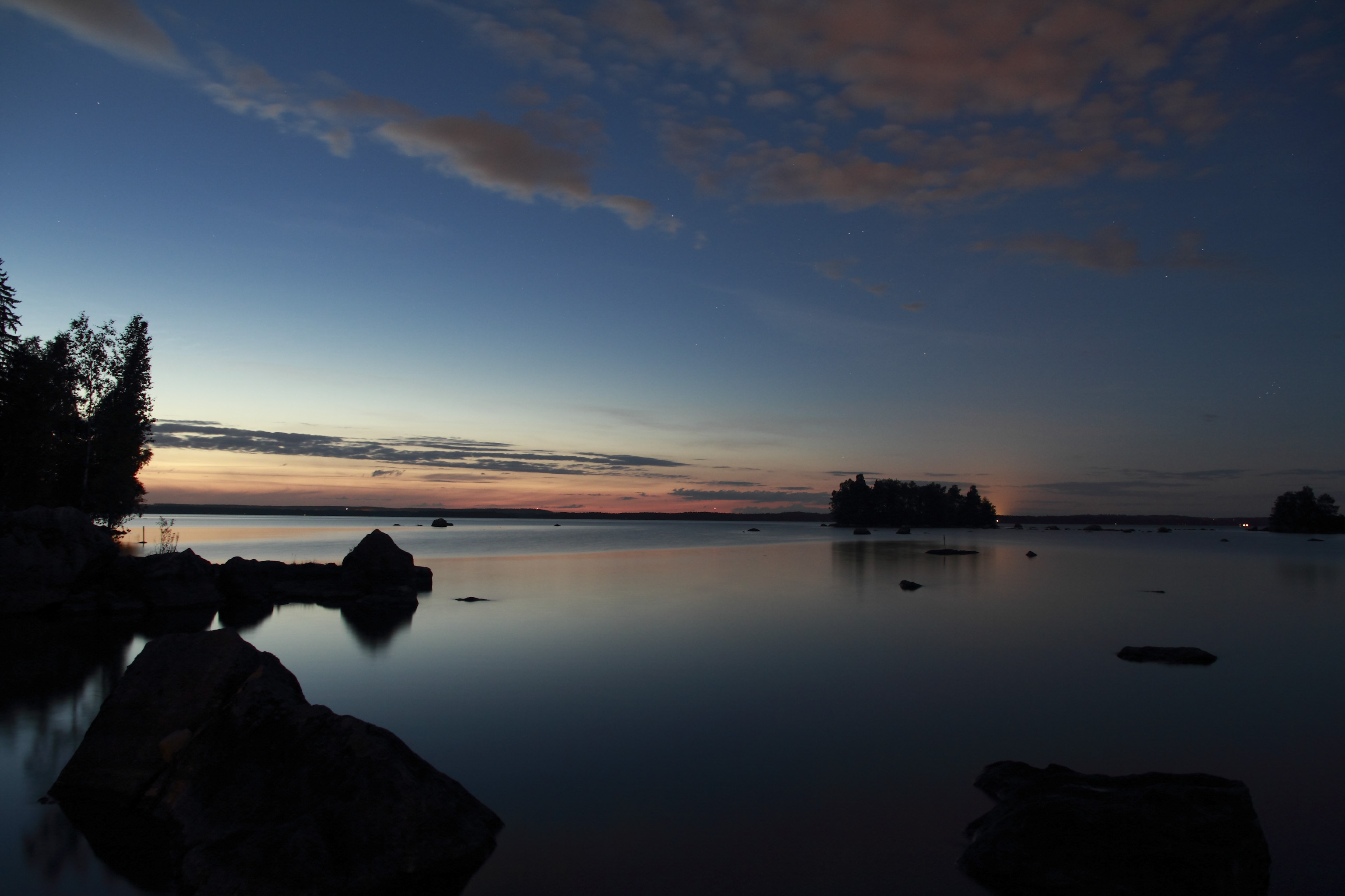 Kuva otettu pohjois-kuohenmaalla